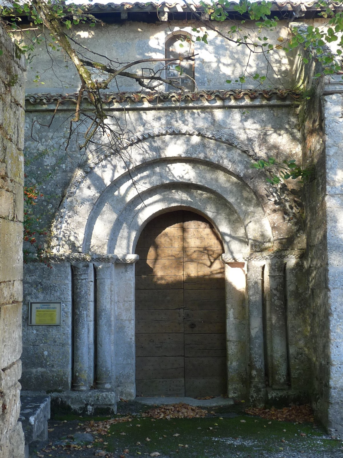 Eglise de Sers, Charente, France